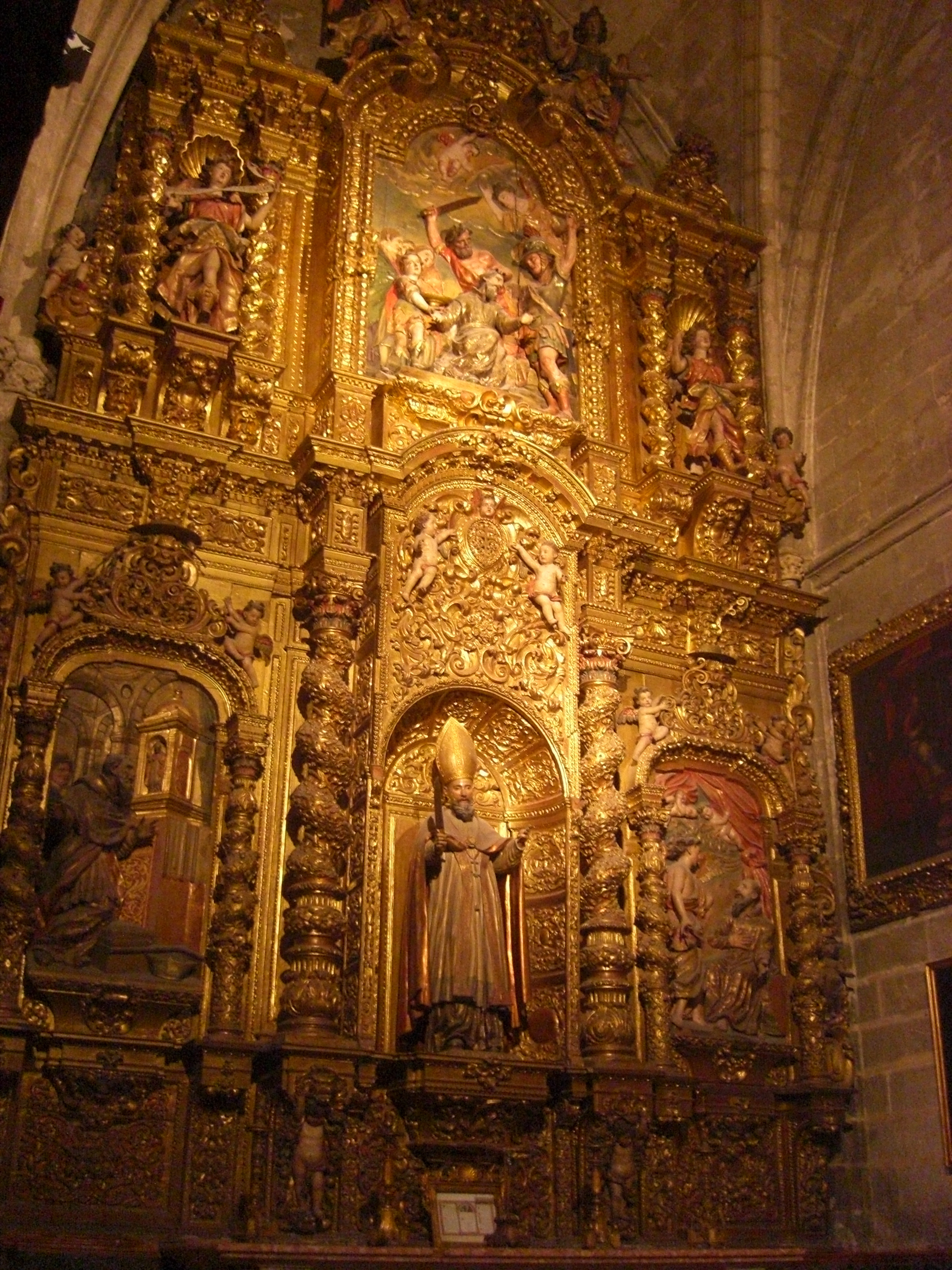 Retablo de la capilla de San Laureano de la catedral de Sevilla, (España).